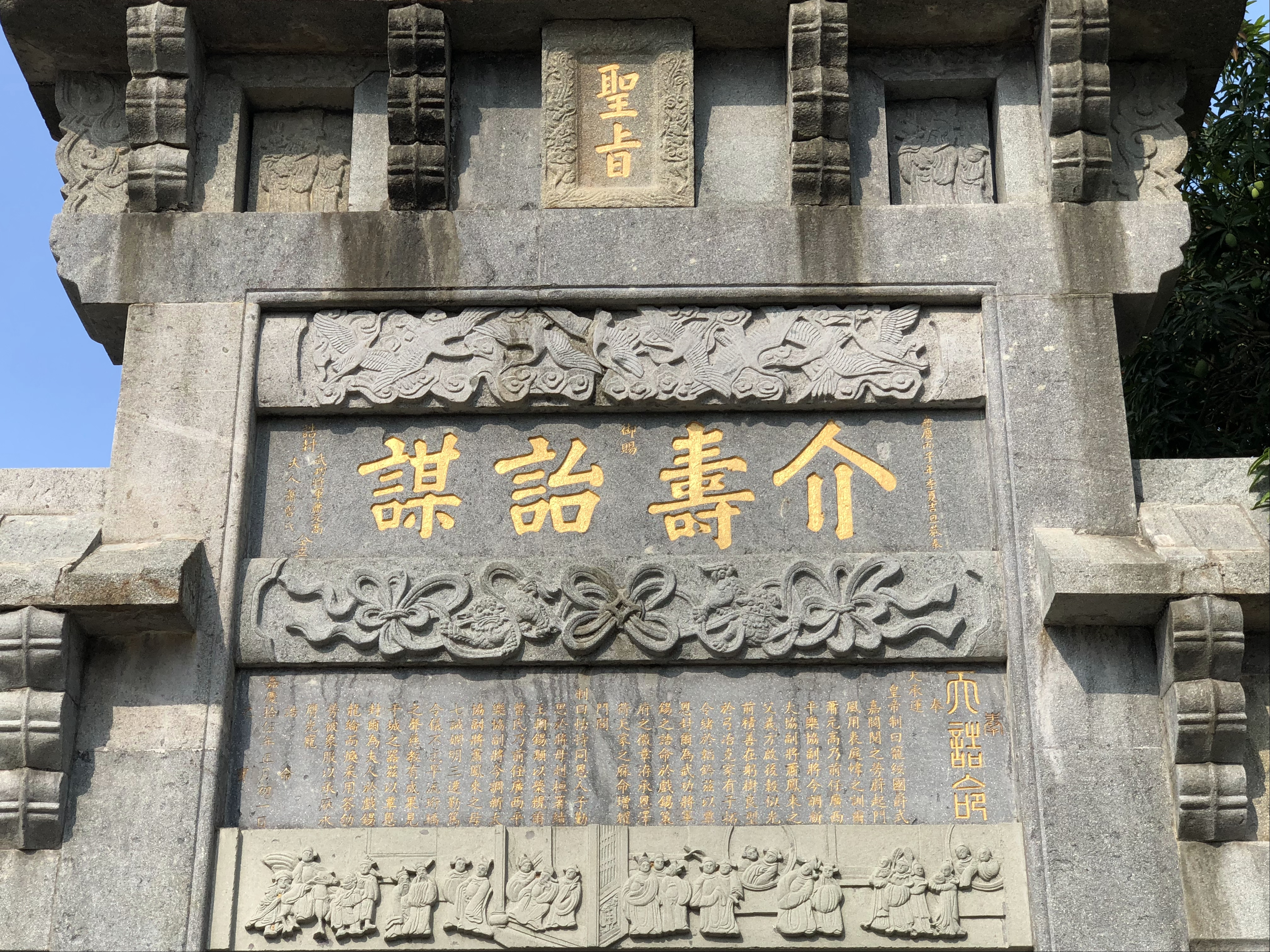 介寿诒谋牌坊 正面局部